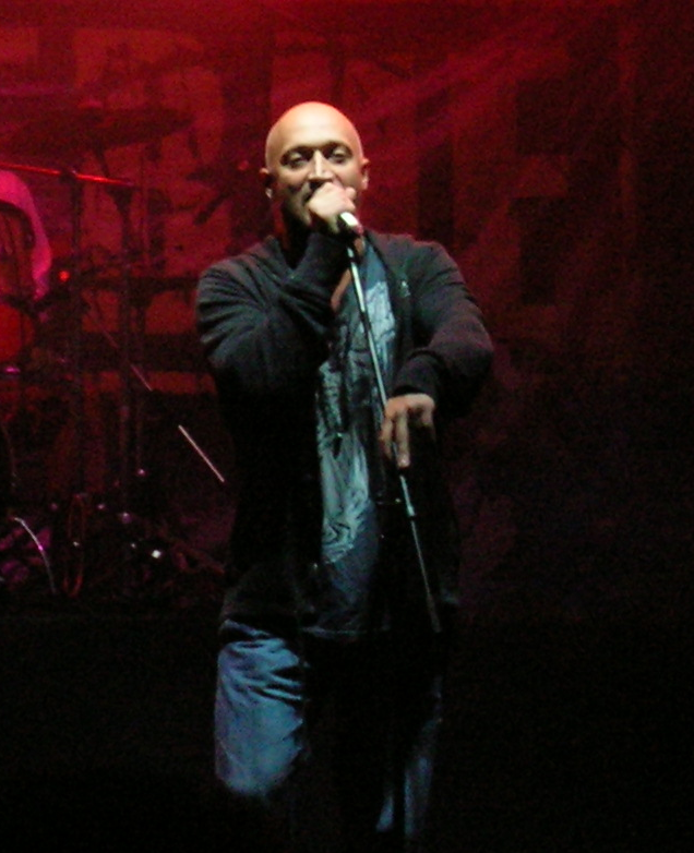 Гоша Куценко на фестивале Нашествие-2009